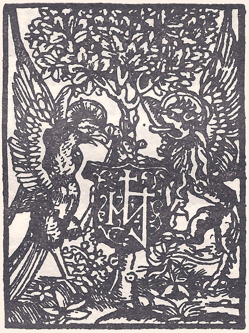 Monogramm von Markus und Johannes Reinhard alias Grüninger (um 1492). Der Adler steht für Johannes, der Löwe für Markus.